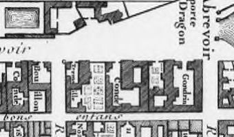 Plan de Versailles, du petit parc, et de ses dependances où sont marqués les emplacemens de chaque maison de cette ville, les plans du Château, et des hôtels, et les distributions des jardins et bosquets / par Mr l'abbé Delagrive Source : Bibliothèque nationale de France, département Cartes et plans, CPL GE DD-2987 (834 B)